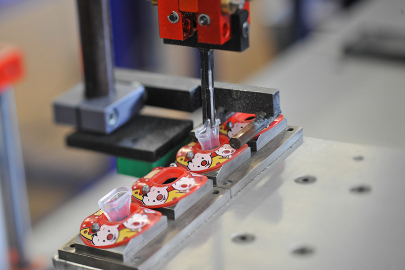 Bibi Nuggimontage (Schnuller-Fertigung)